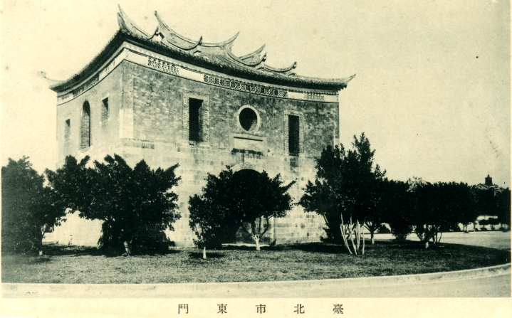 改建前的臺北府城東門，拍攝時間為日據時代。